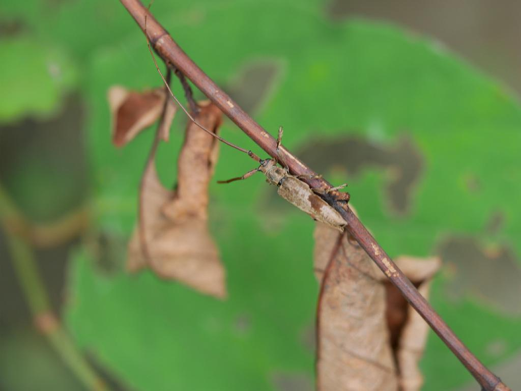 2019/07/09 和歌山県田辺市：Tanabe City. Wakayama Pref. Japan